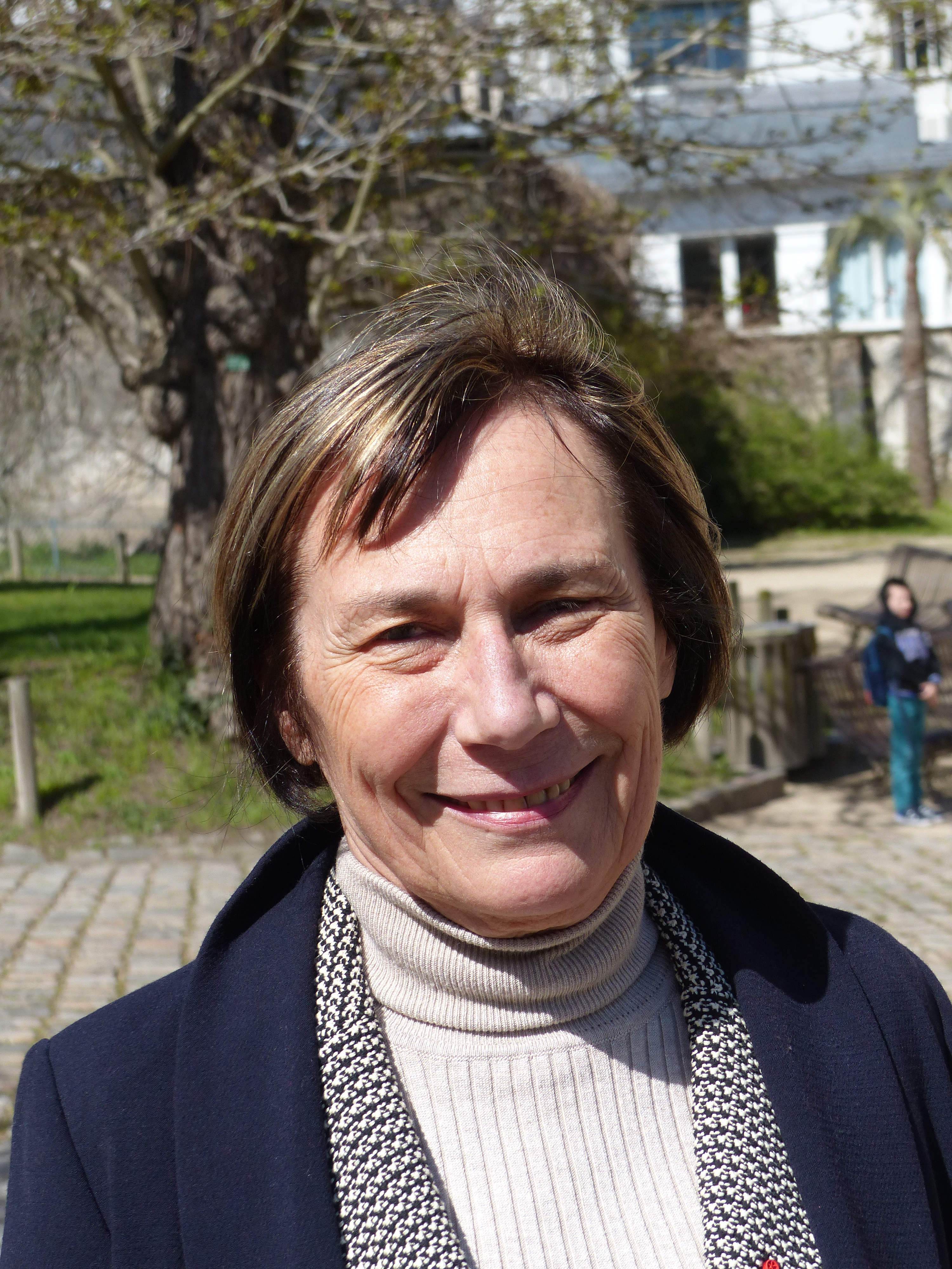 Catherine Barthélémy à l'extérieur, lors du lancement du 4e plan autisme (ou stratégie autisme) le 6 avril 2018. Photographie prise spécifiquement pour sa page de Wikipédia et avec son accord.